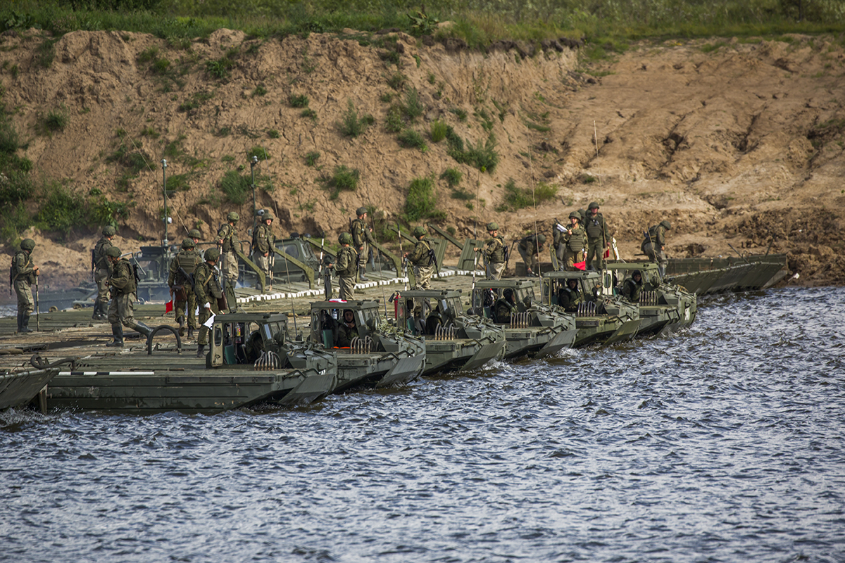 Инженерные войска в ходе учений оборудовали мостовые переправы на реках в четырех регионах России. На заключительном этапе учений подразделения Инженерных войск отработали практические действия по оборудованию пяти речных переправ в четырех регионах России – Липецкой, Рязанской, Калужской и Владимирской областях. Особенностью проводимых мероприятий стало оборудование мостовой переправы на реке Ока способом стыковки в линию моста комплекта понтонного парка ПП-2005 и паромно-мостовых машин ПММ-2М с применением переходных звеньев.